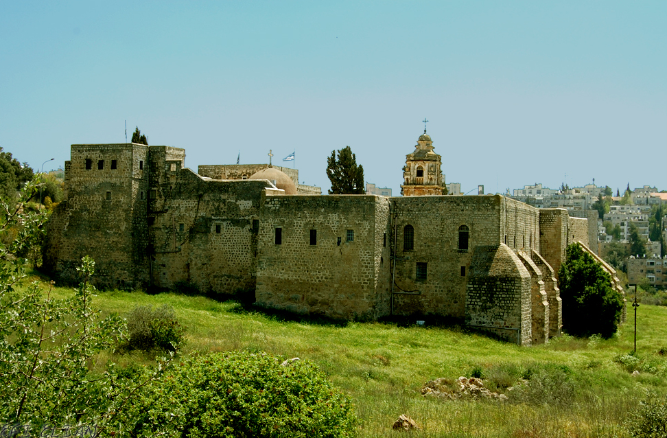 מנזר המצלבה בירושלים